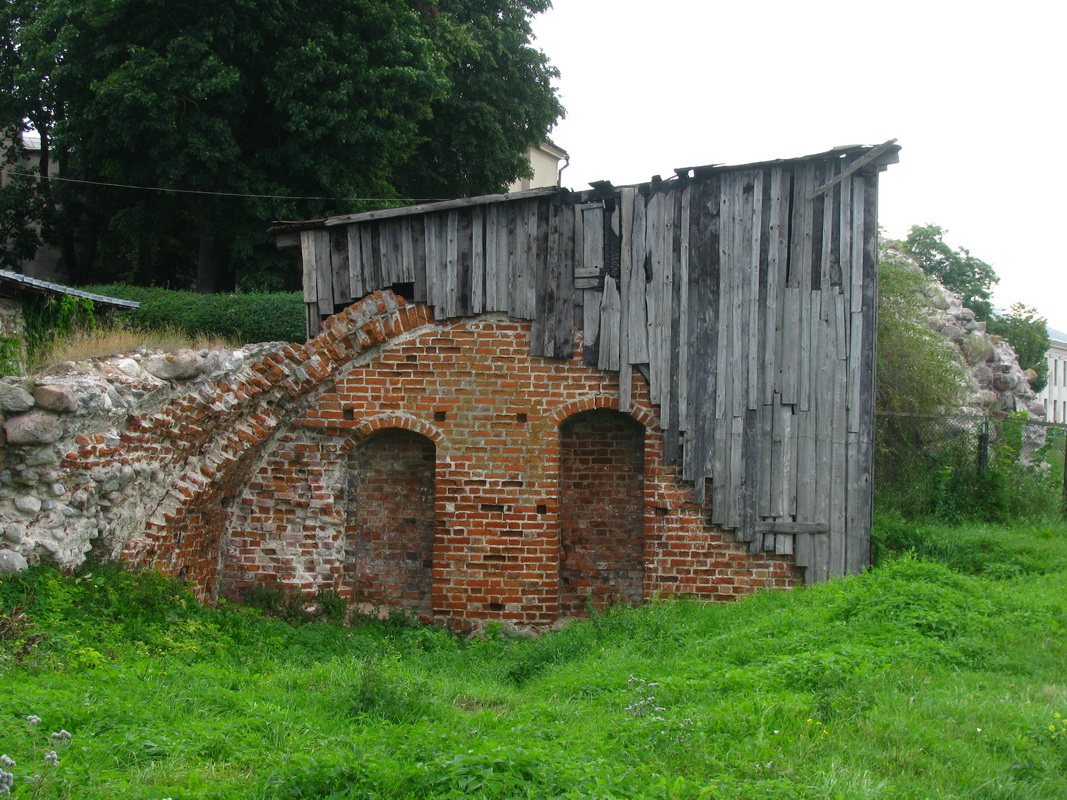 Руины старого замка. Гродно. Ruins of an old castle. Grodno.